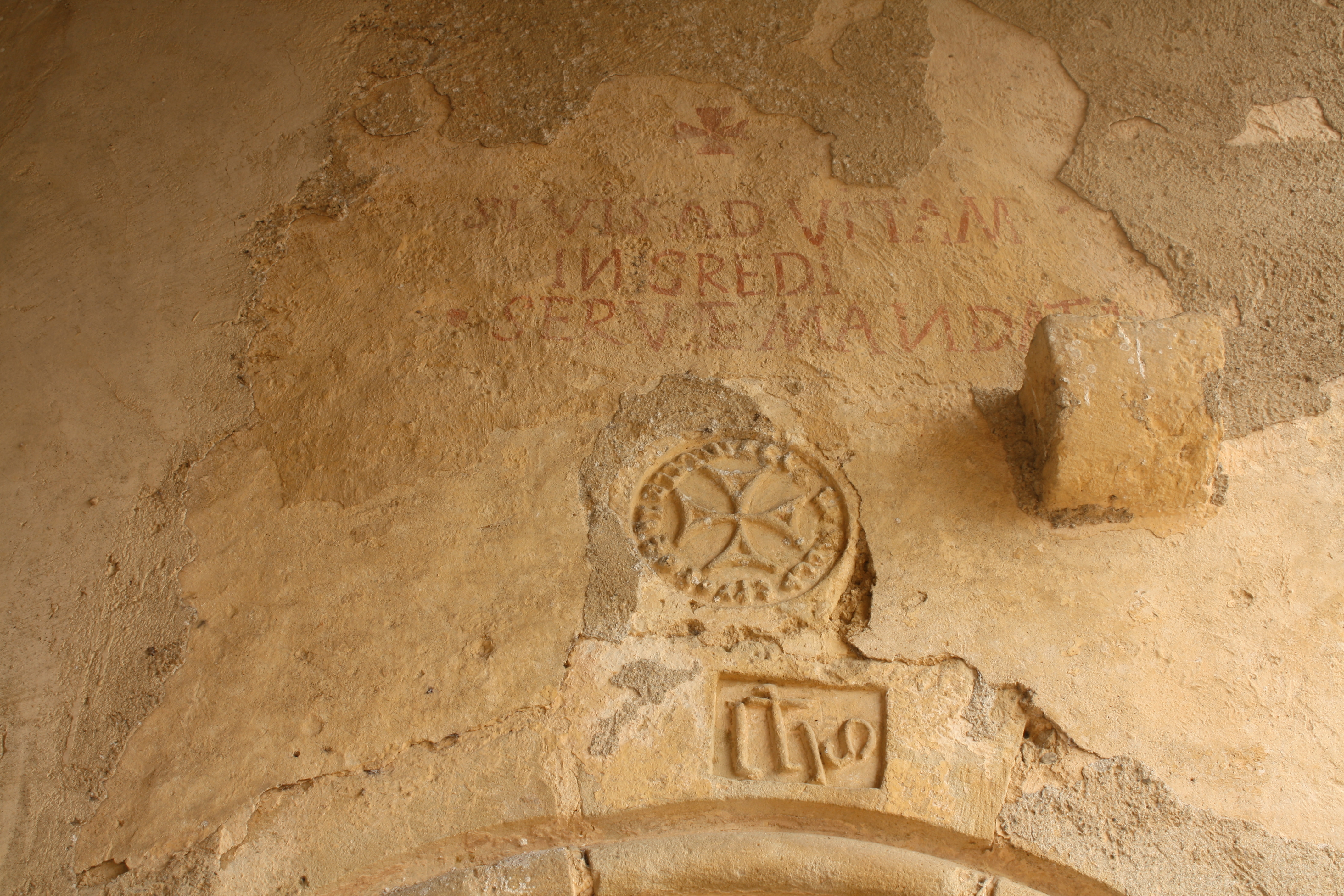 Église Saint-Martin de Lasserreéglise et portail du cimetière